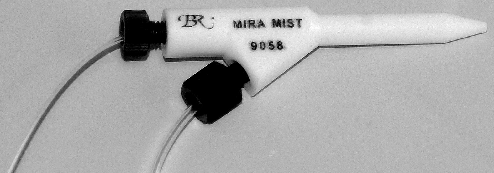 Ritaglio da File:ICP-MS abb04.jpg